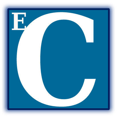 Logotipo del periódico de 2010